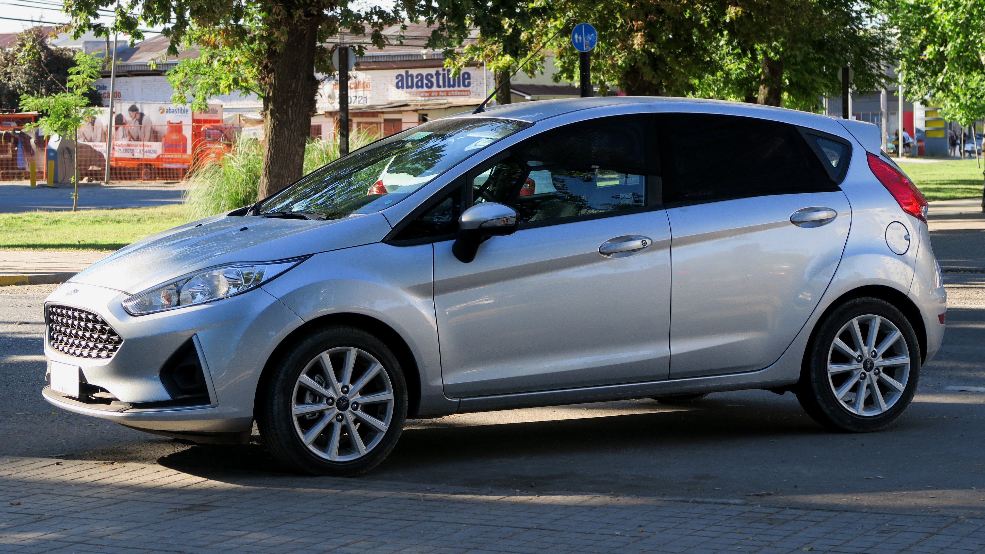 Ford Fiesta 1.6 SE 2019